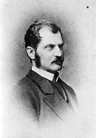 Georg von Stockau (1837 - 1922), Rakouský šlechtic a politik.